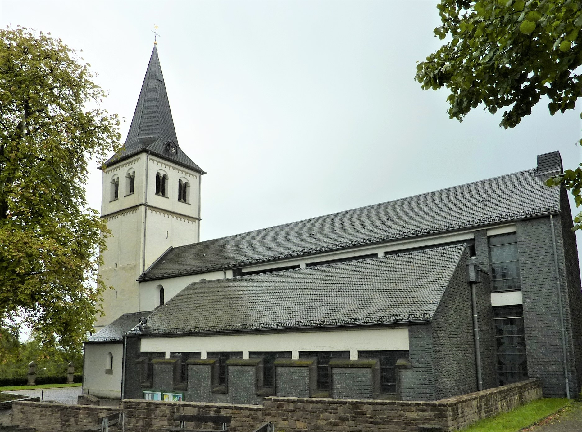 St. Antonius Abbas (Herkenrath)